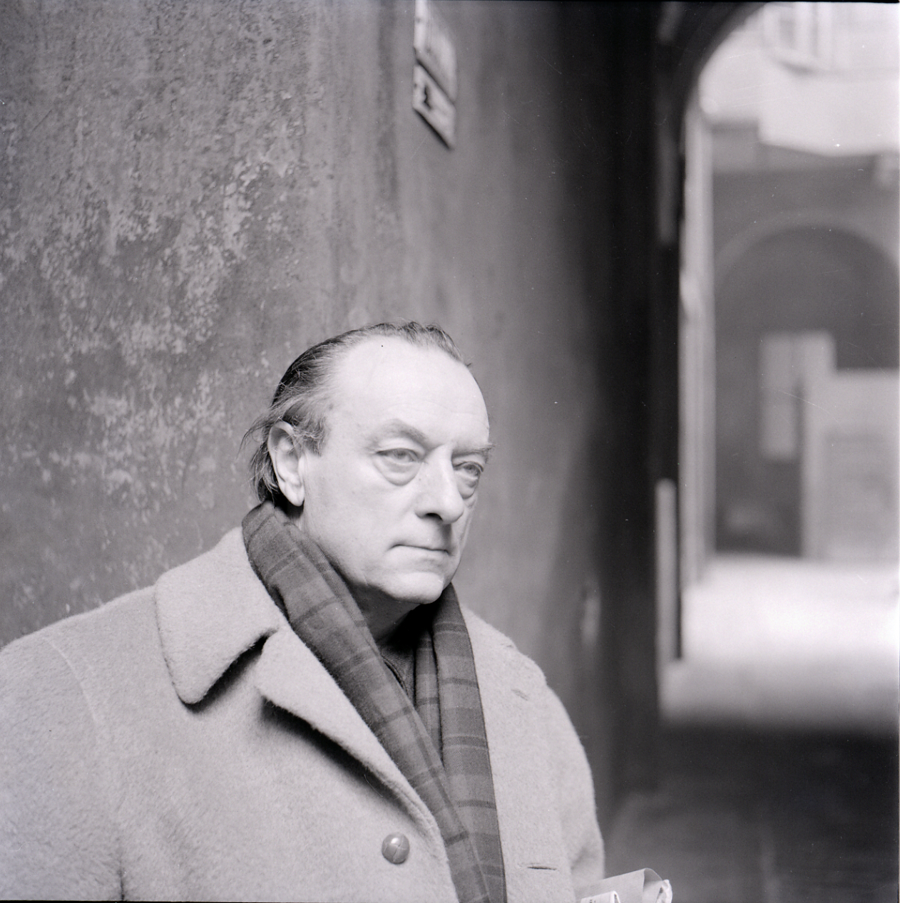 Servizio fotografico : Italia, 1982 / Paolo Monti. - Buste: 27, Fototipi: 30 : Negativo b/n, gelatina bromuro d'argento/ pellicola ; 6x6. - ((Serie costituita da 27 buste di carta, tenute insieme da una graffetta, identificate con i nn.: R4172, R4173, R4174, R4175, R4176. - Sulla busta R4172: "Campigli". - Fonte: Rubrica di Paolo Monti: Archivio 10x12 (ultimi numerati) - dal G1 al (s.d.), presso Archivio Paolo Monti